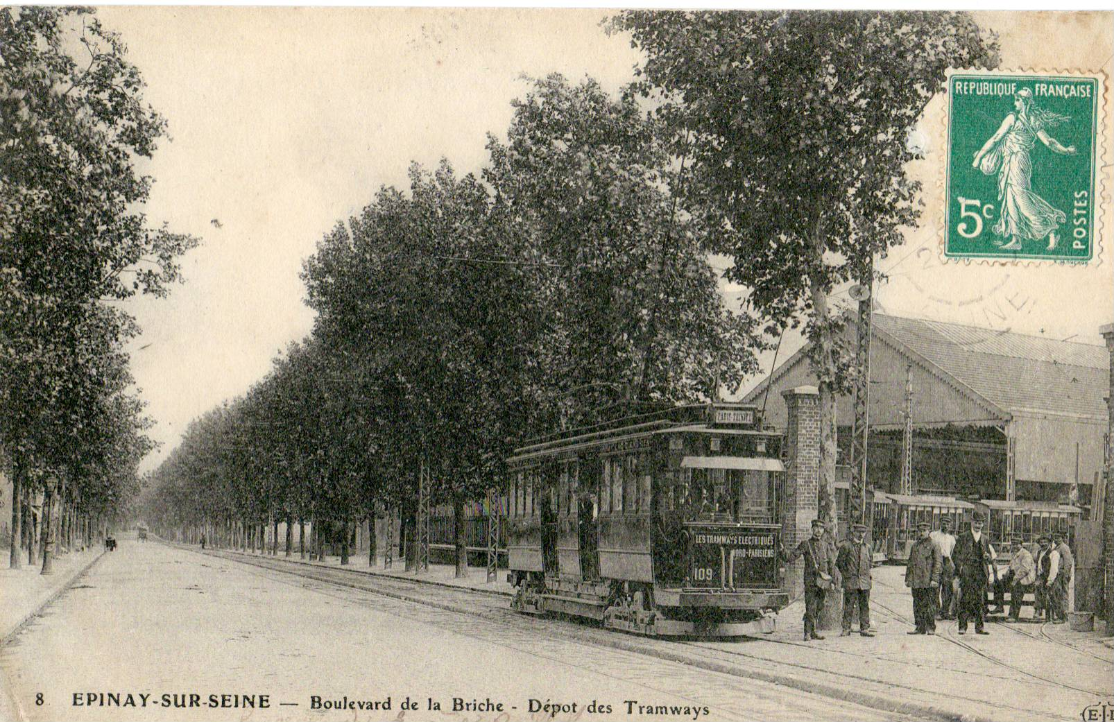 Carte postale ancienne éditée par ELD N°8Épinay-sur-Seine - Boulevard de la Briche - Dépot des tramways